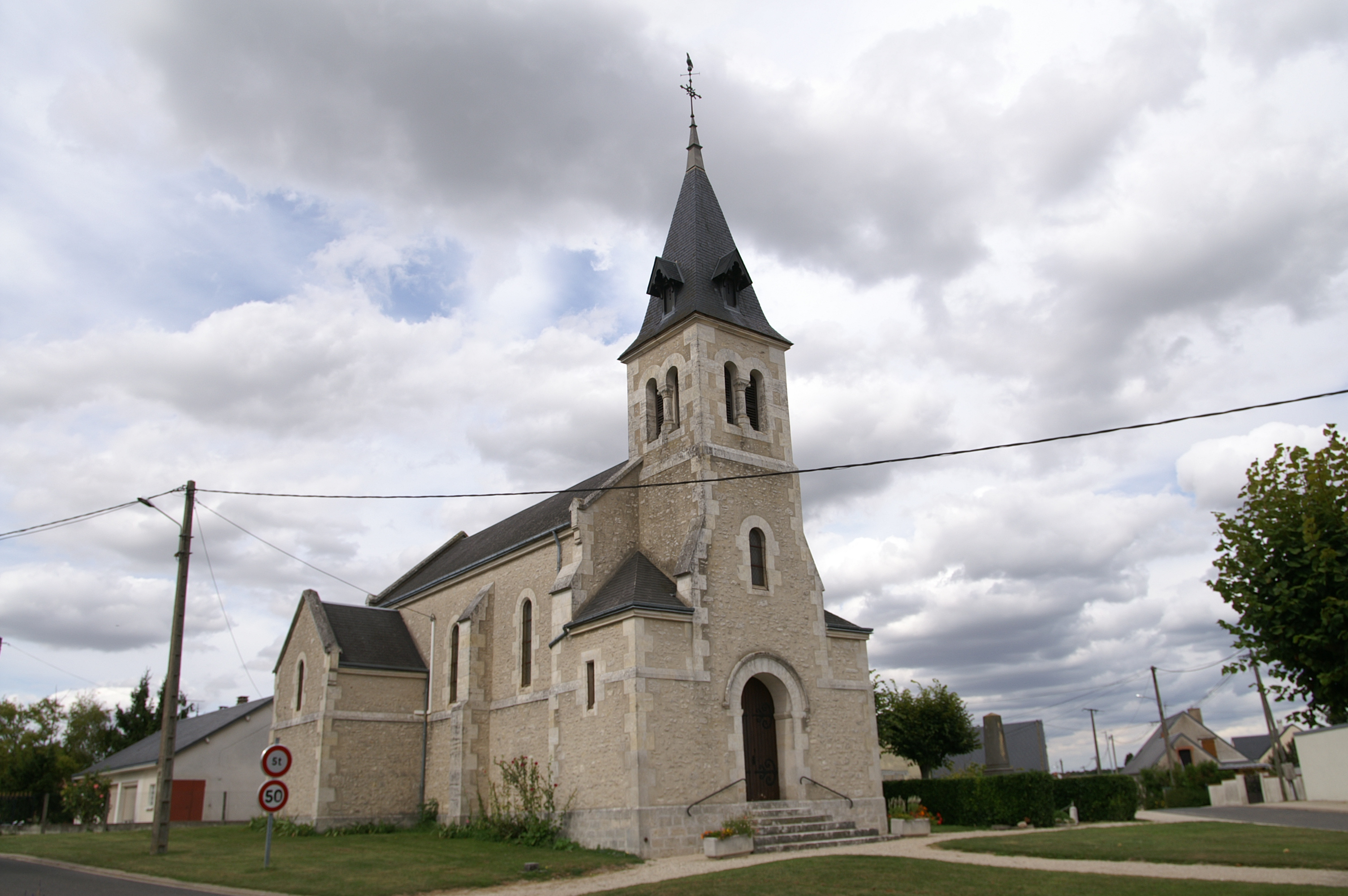 Église Saint-Liphard de Bucy-Saint-Liphard.